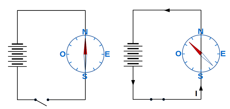 Experiment d'Oersted. Una bateria proporciona un corrent elèctric d'intensitat I que circula per un conductor amb una secció orientada nord-sud just damunt una brúixola. Quan passa el corrent l'agulla magnètica es desvia cap el nord-oest si la intensitat circula de sud a nord.